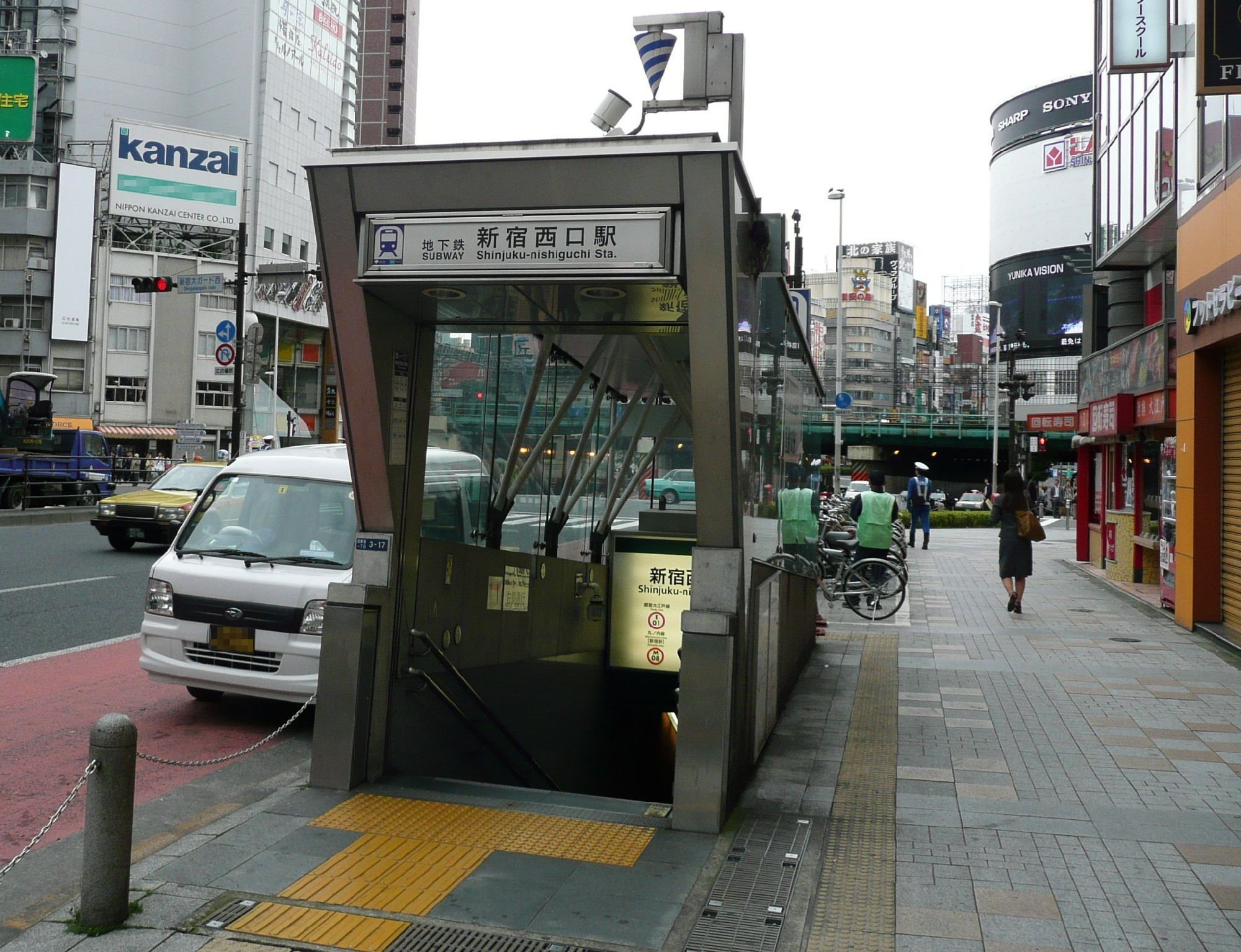 新宿西口駅D4出入口